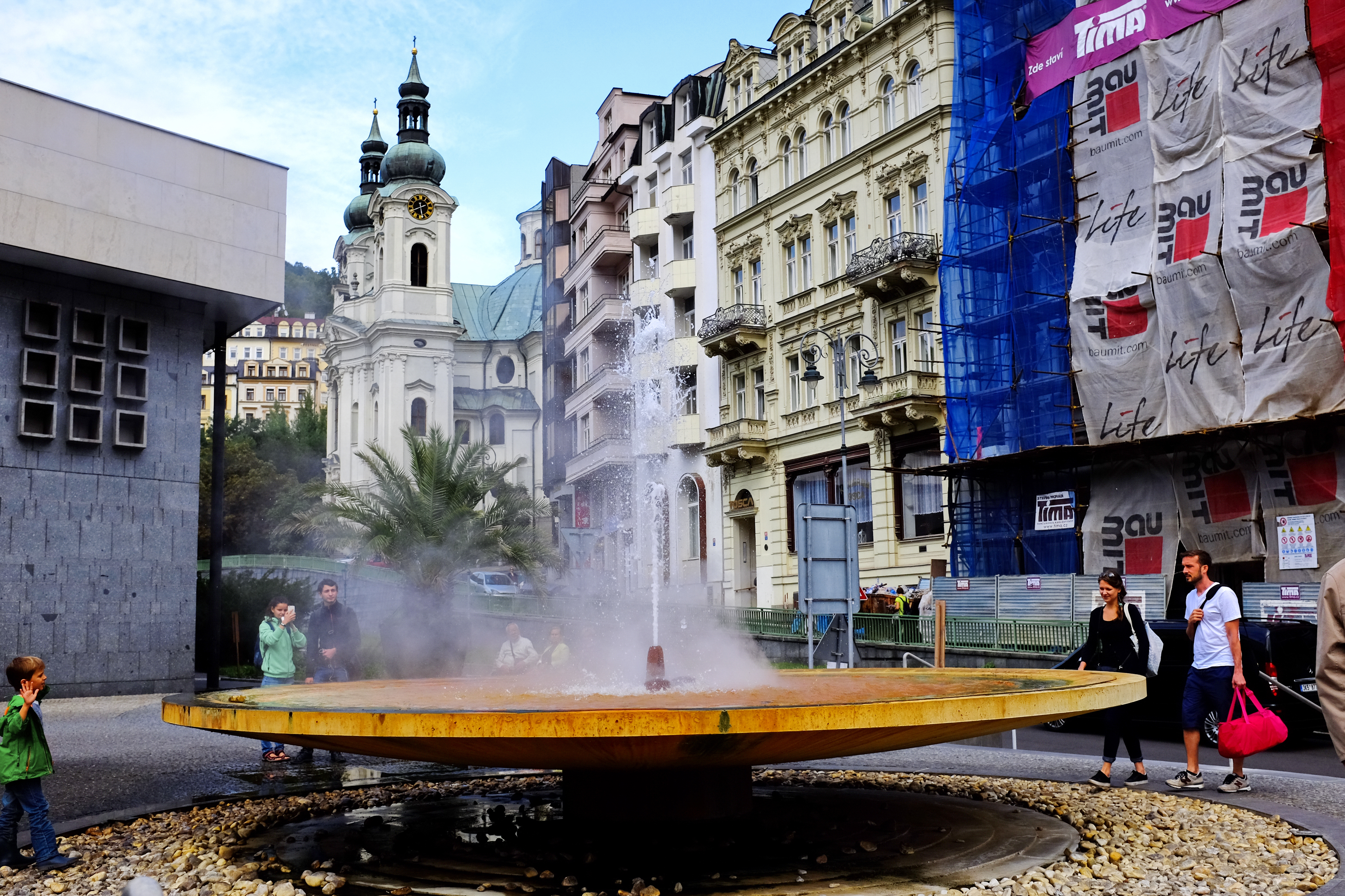 Vřídlo v Karlových Varech přemístěný gejzír před Vřídelní kolonádu